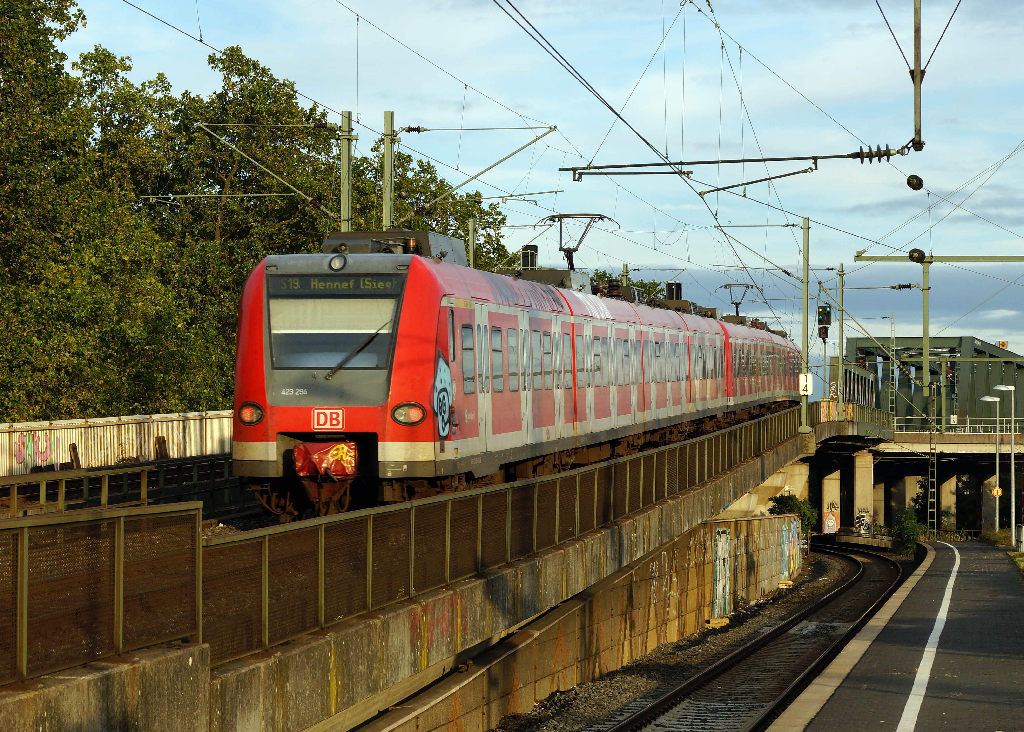 DBAG 423 294 in Köln-Deutz.